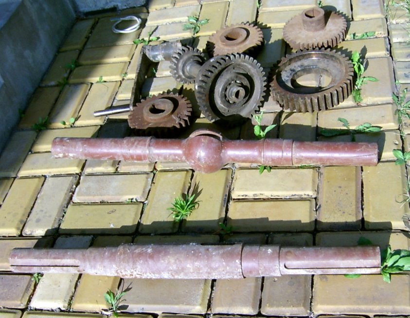 Békési téglagyárból származó Motoros Vontatóhoz tartozó pótalkatrészek (gyári új tengelyek, tengelykapcsoló, fogaskerekek a hajtóműhöz) egy magángyűjteményben (Alföldi Kerti Gazdasági Vasút).